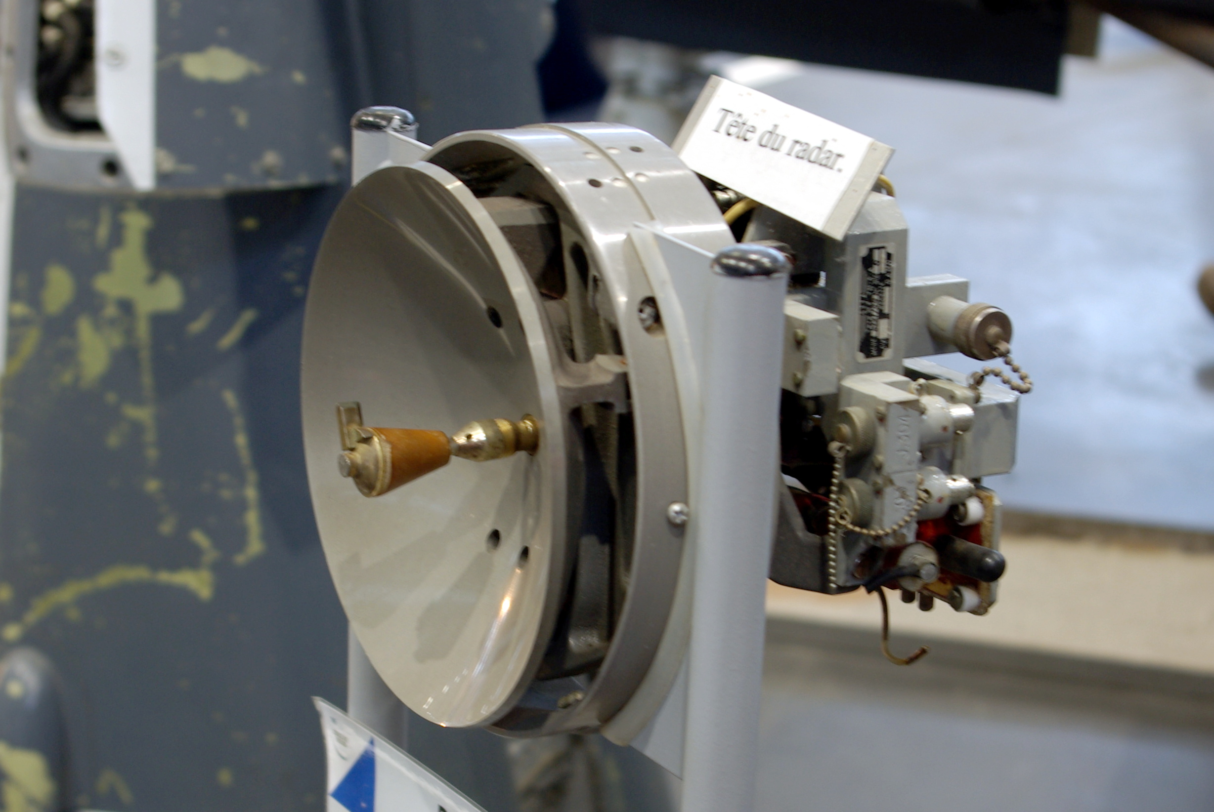 Radar Aïda d'Étendard IVM au musée régional de l'air d'Angers-Marcé.